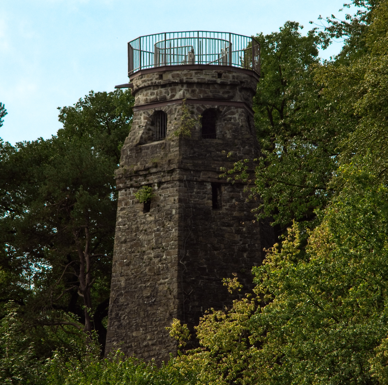 Der Bismarckturm in Wiehl Koordinaten: 50° 56′ 42″ N, 7° 32′ 36″ O